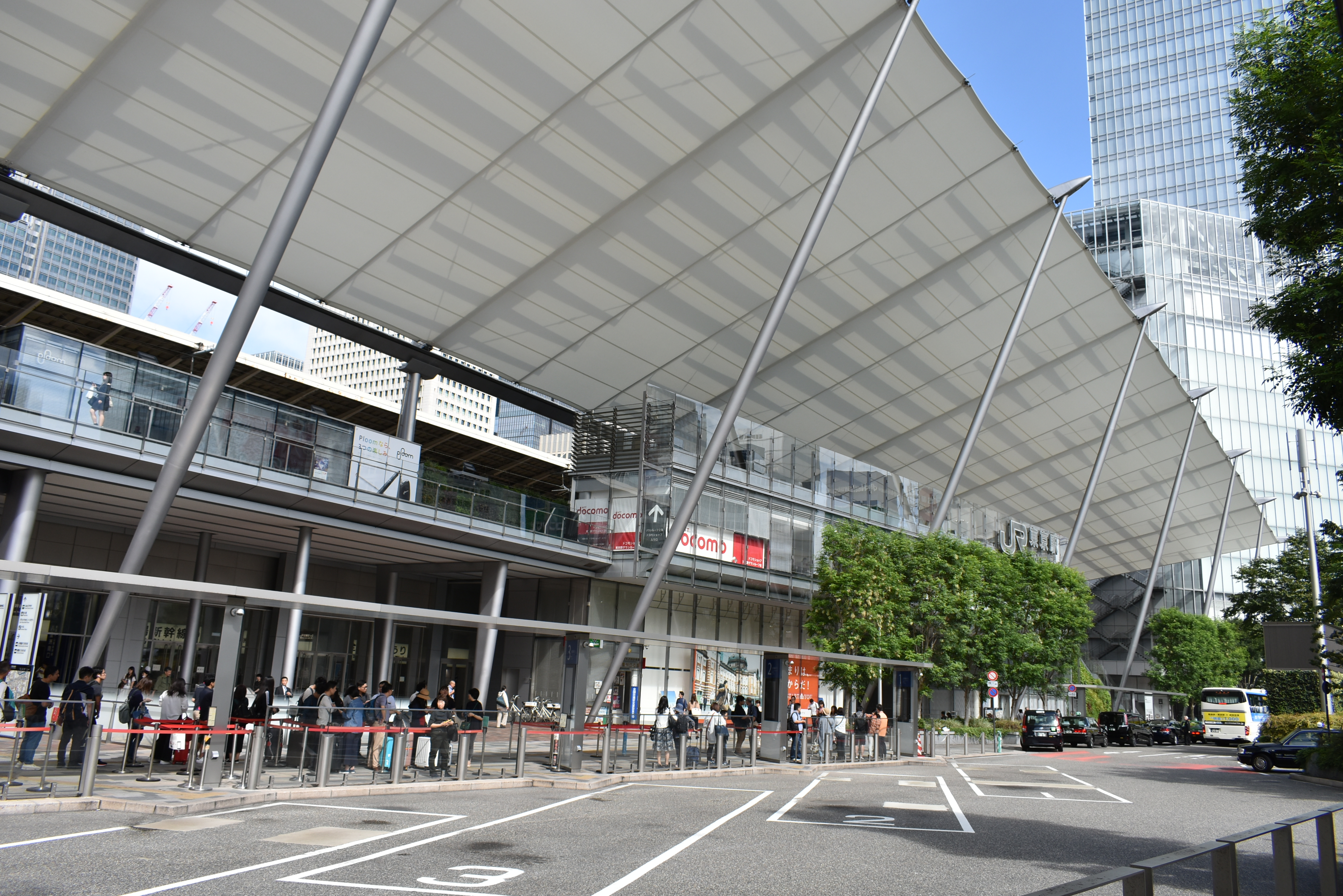 東京駅八重洲口